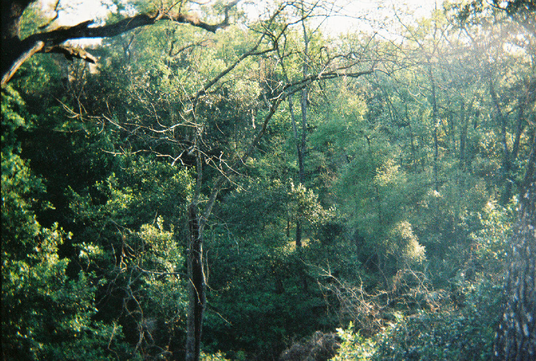 Ravine State Gardens after sunrise, in Palatka, Florida